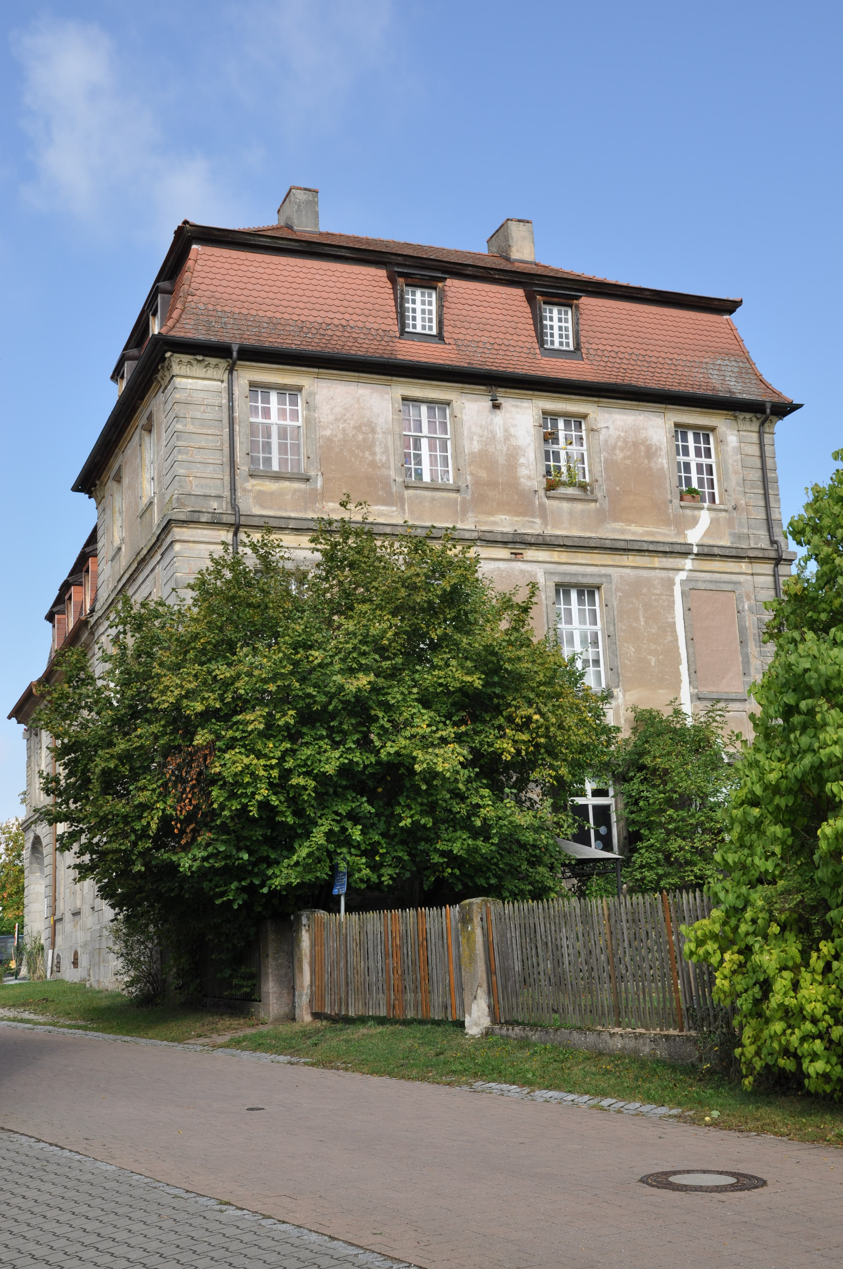 Neues Schloß, unvollendeter Einflügelbau mit Mansarddach, 1753This is a photograph of an architectural monument.